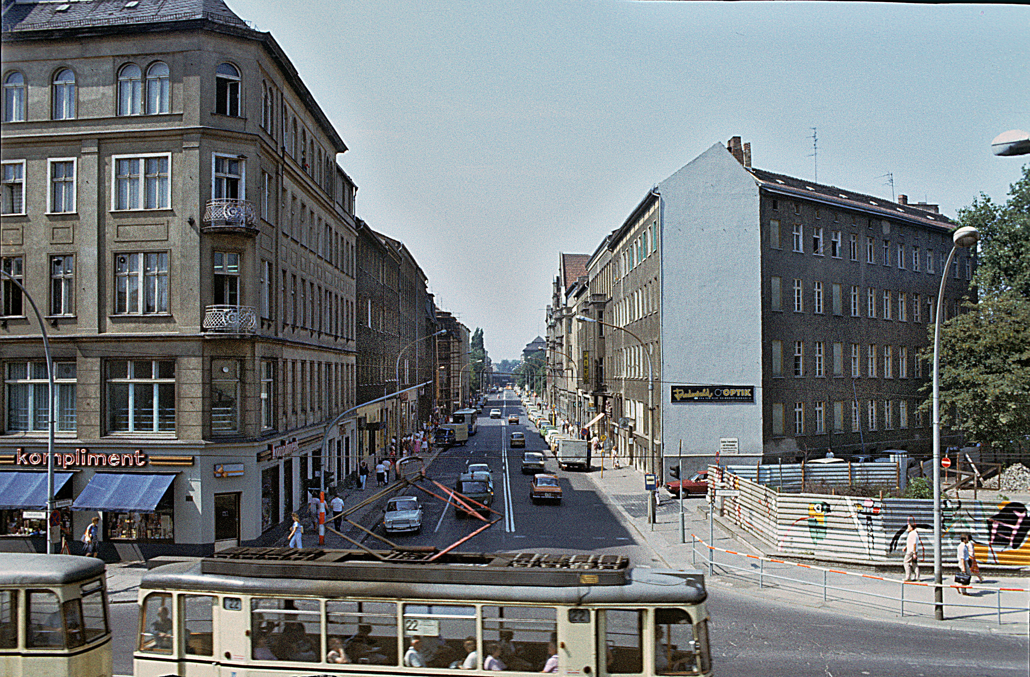 Berlin-Friedrichstraße Ecke Reinhardtstraße, kompliment, Straßenbahnlinie 22